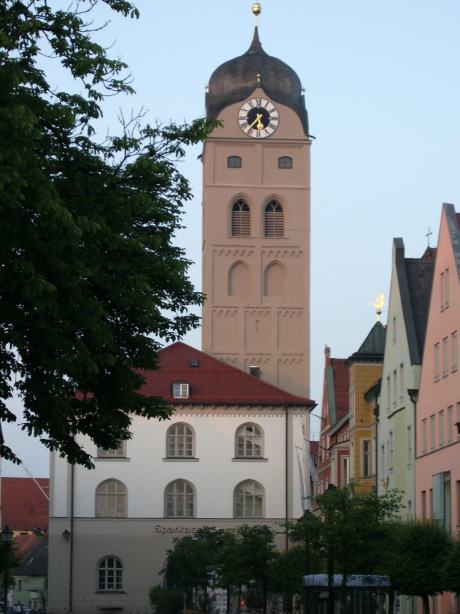 Erding Pfarrkirche St. Johann - Turm